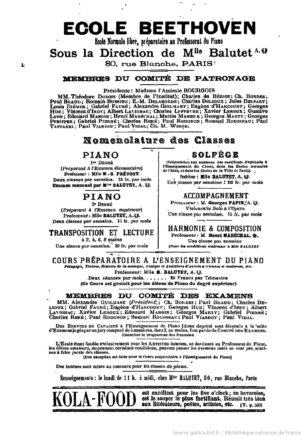 annonce pour l'École Beethoven (créée et dirigée par Marguerite Balutet) parue dans l'Annuaire des artistes et de l'enseignement dramatique et musical de 1899